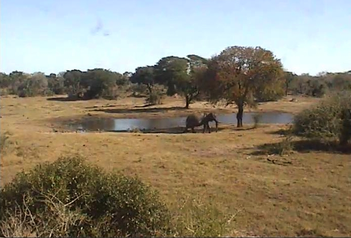 NORMALLY ITS FULL OF ANIMALS, PROBABLY ARE LIONS AROUND